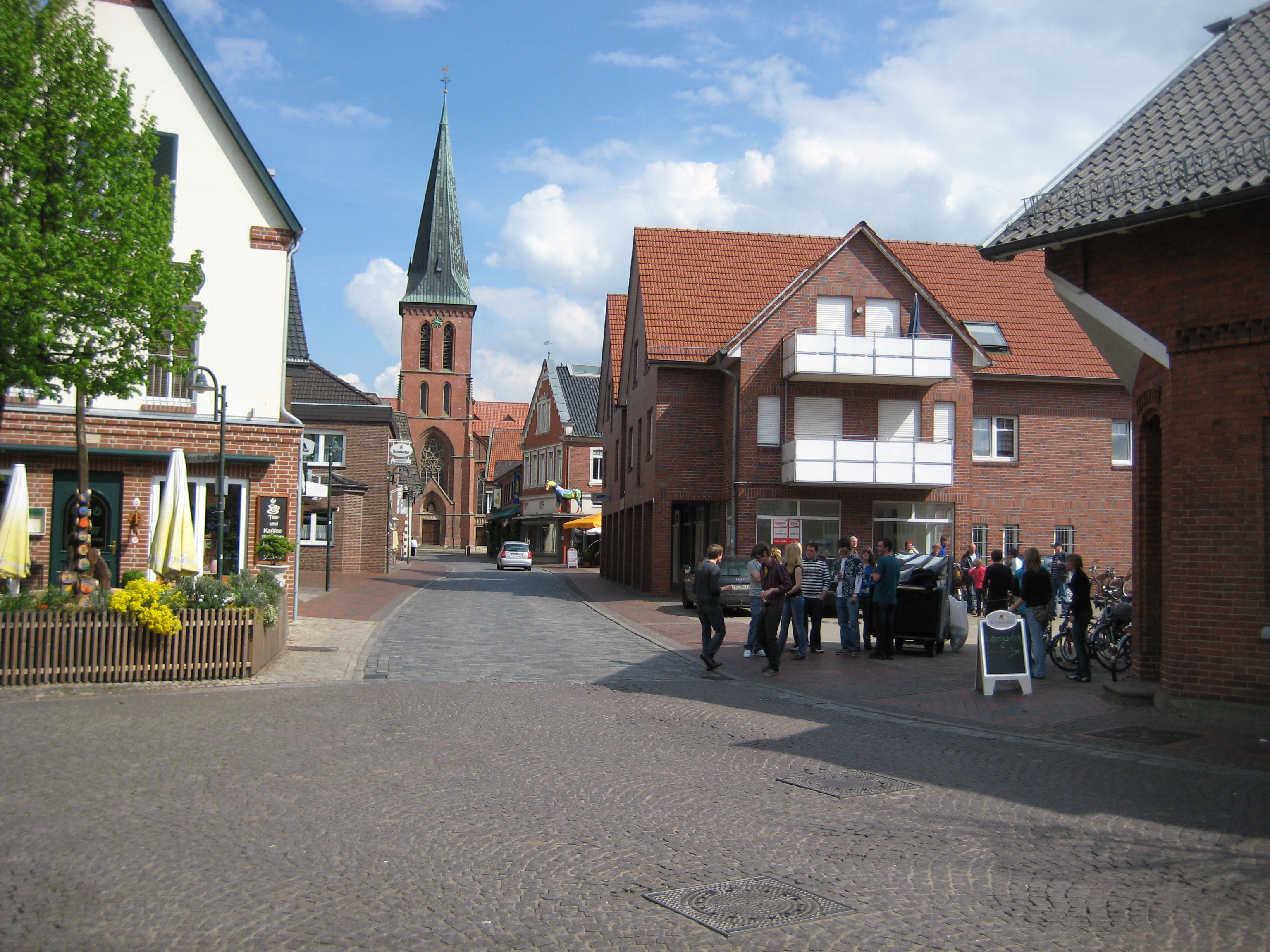 Ortsmitte der Gemeinde Steinfeld (Oldb) (Landkreis Vechta) mit Blick auf die Kirche